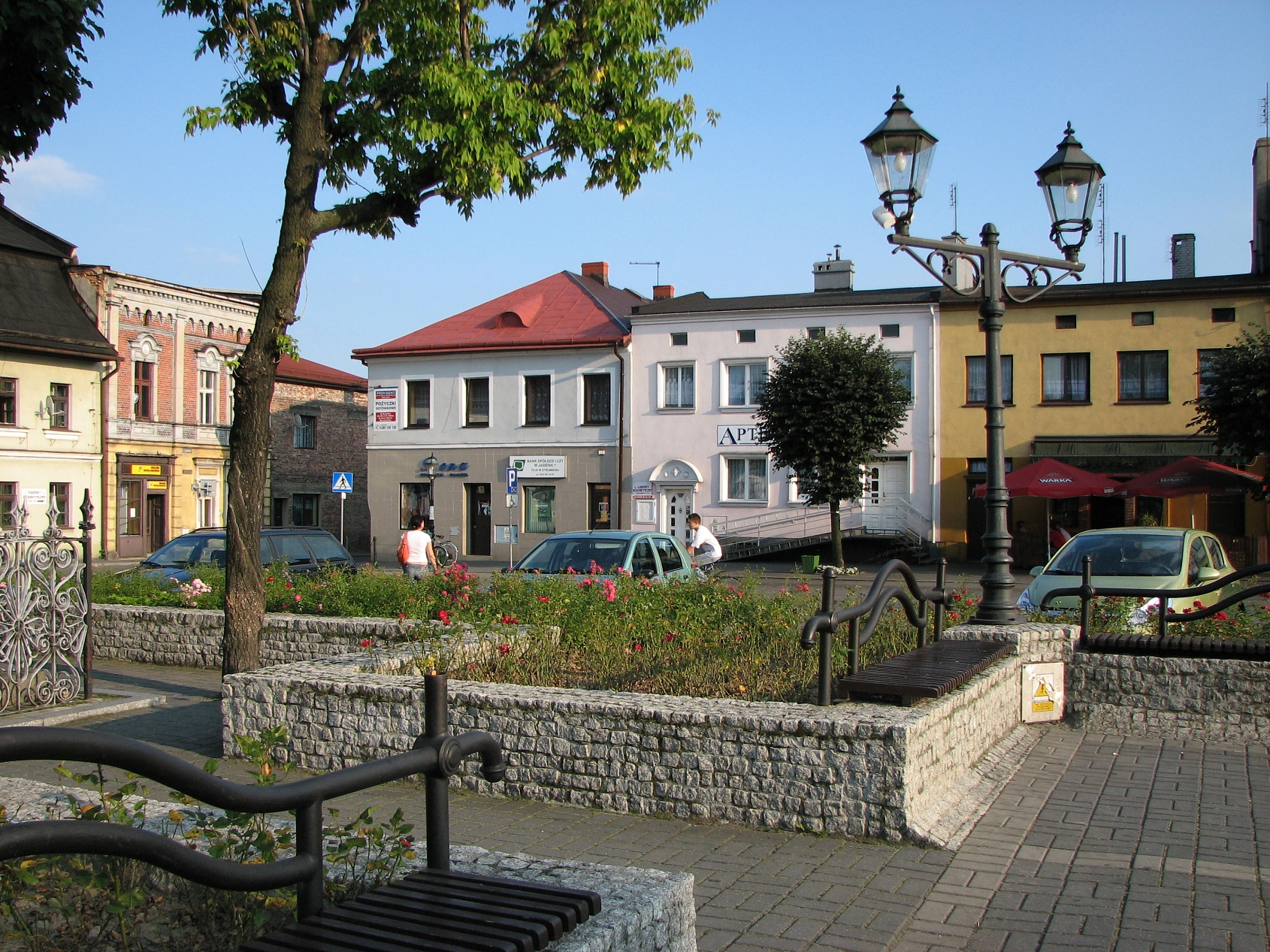 Market Square in Strumień